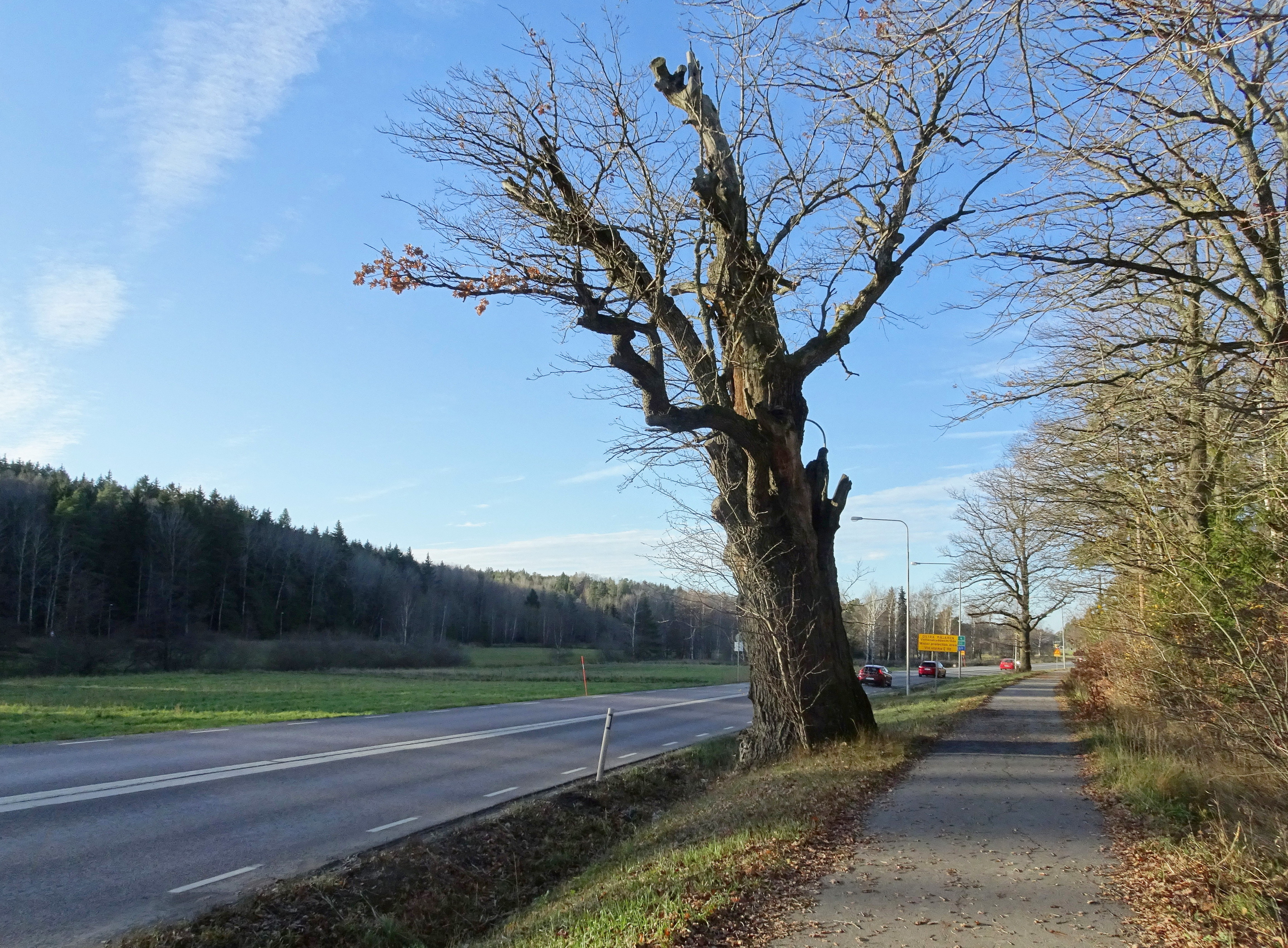 Hagsta-eken, naturminne vid Glömstavägen i Huddinge